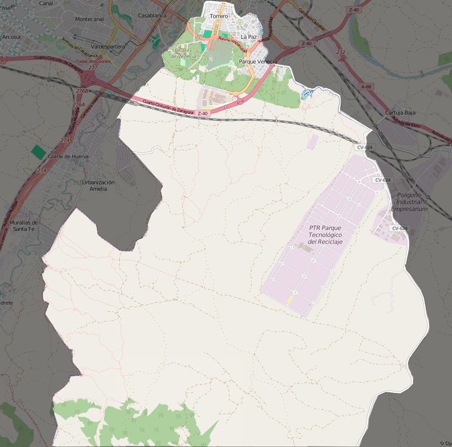 Mapa del distrito de Torrero-La Paz en Zaragoza.